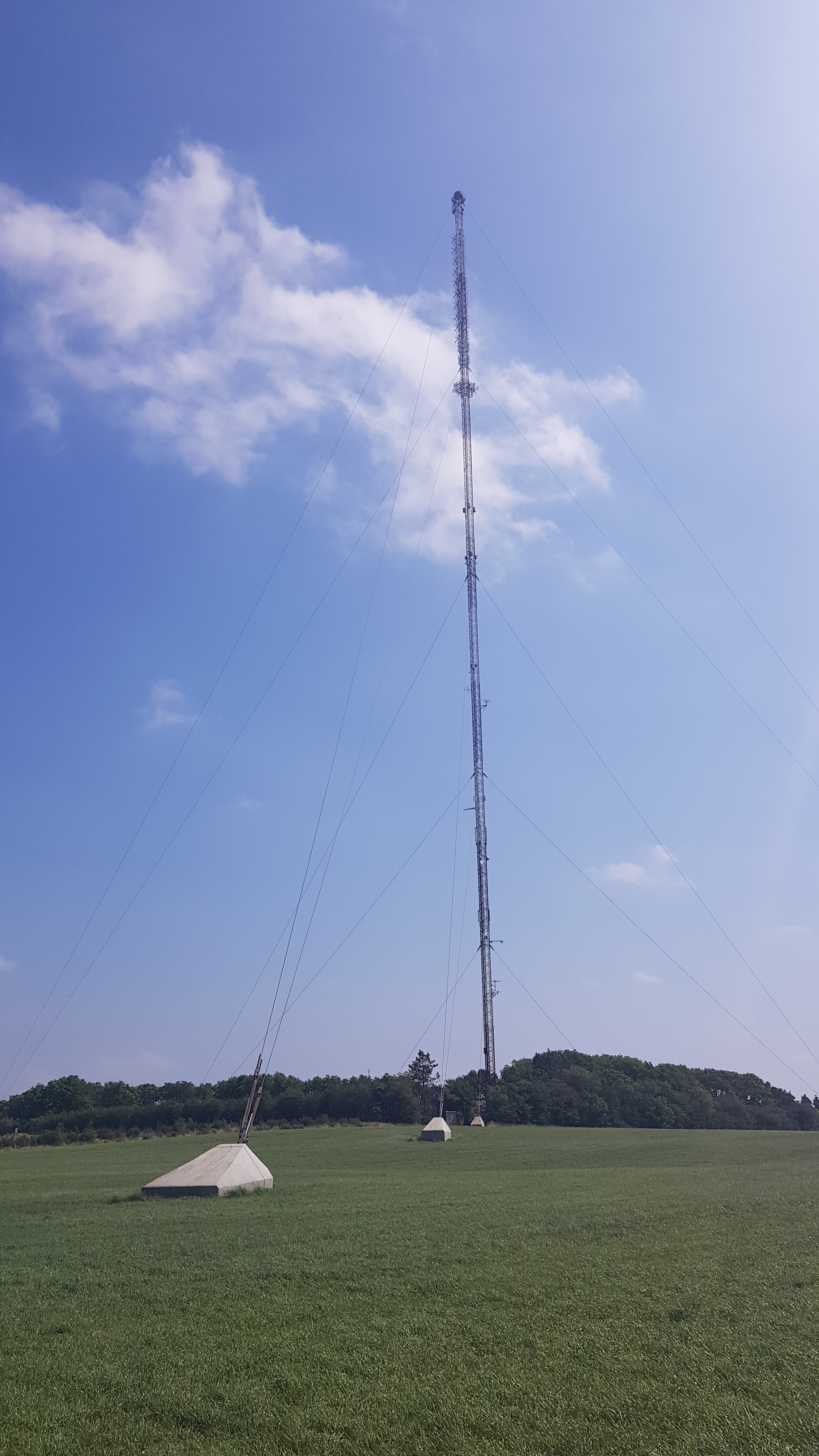 Rangstrupsenderen set fra Jørgensbyvej